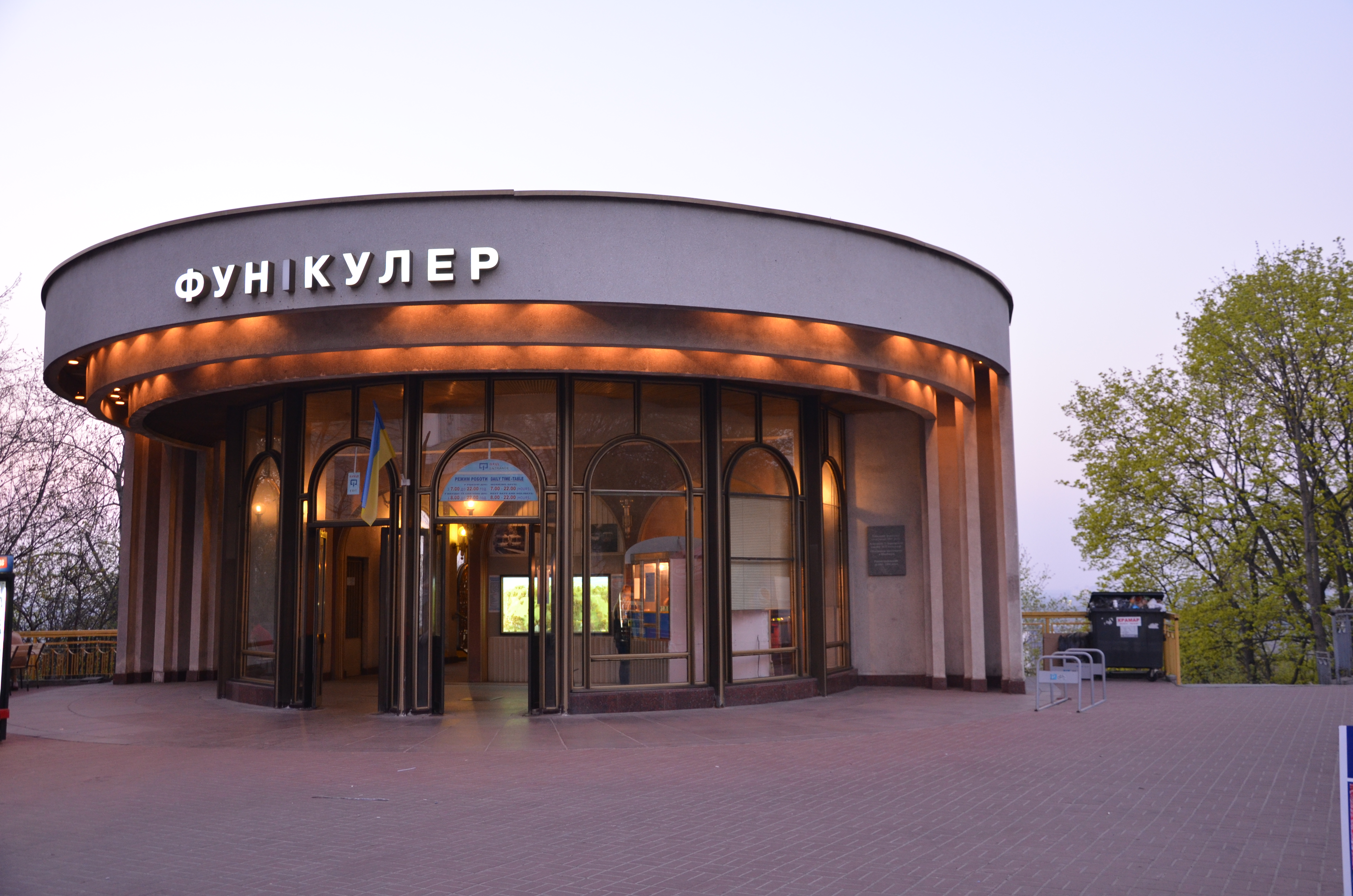 Михайлівський механічний підйом (фунікулер), Київ, Поштова пл.